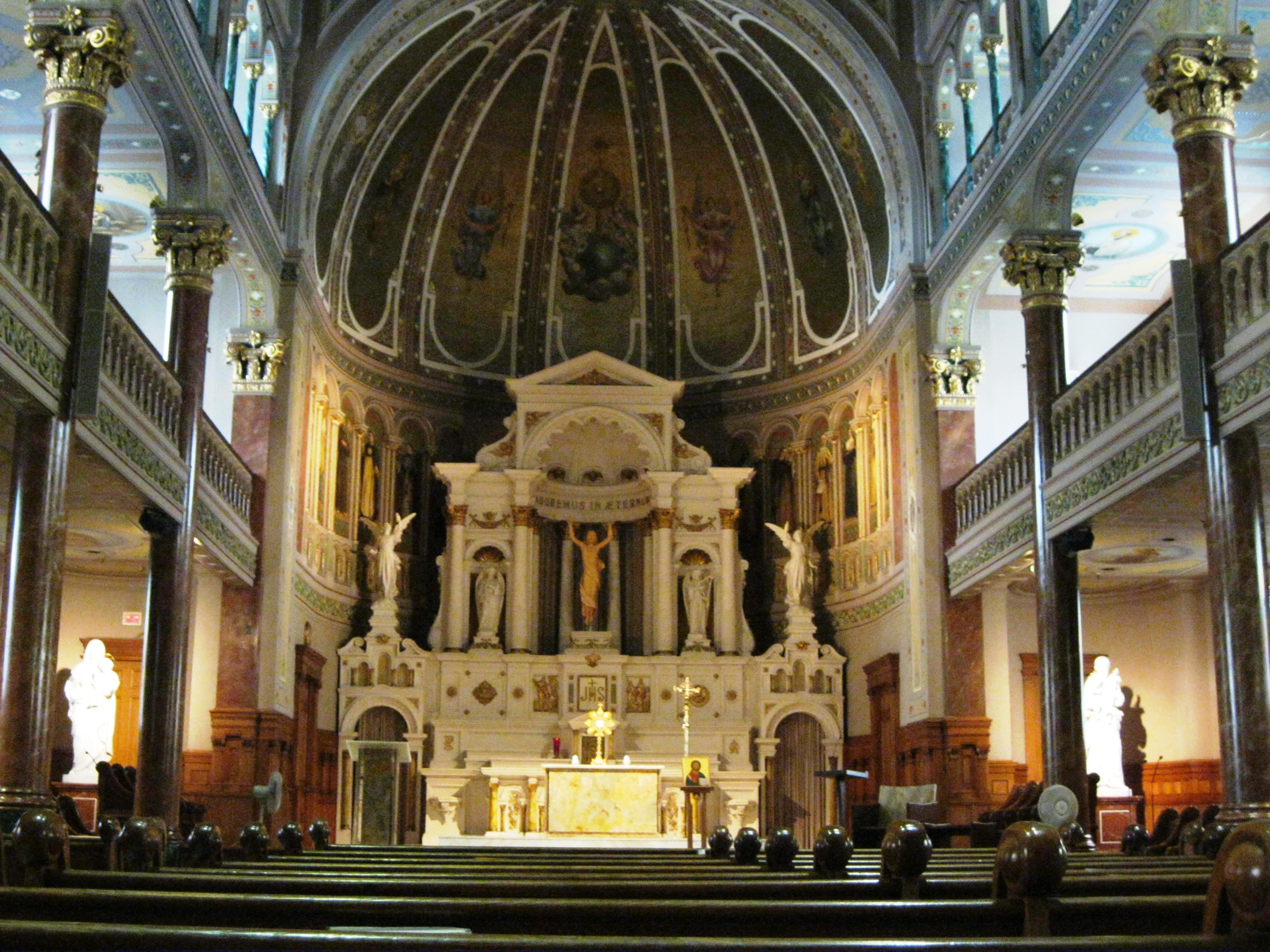 Le sanctuaire du Saint-Sacrement est un sanctuaire catholique du diocèse de Montréal dont l'animation spirituelle a été confiée aux fraternités monastiques de Jérusalem. Il a été construit en 1890 par les pères du Saint-Sacrement. Il est situé au 500, avenue du Mont-Royal, dans l'arrondissement du Plateau-Mont-Royal à Montréal.